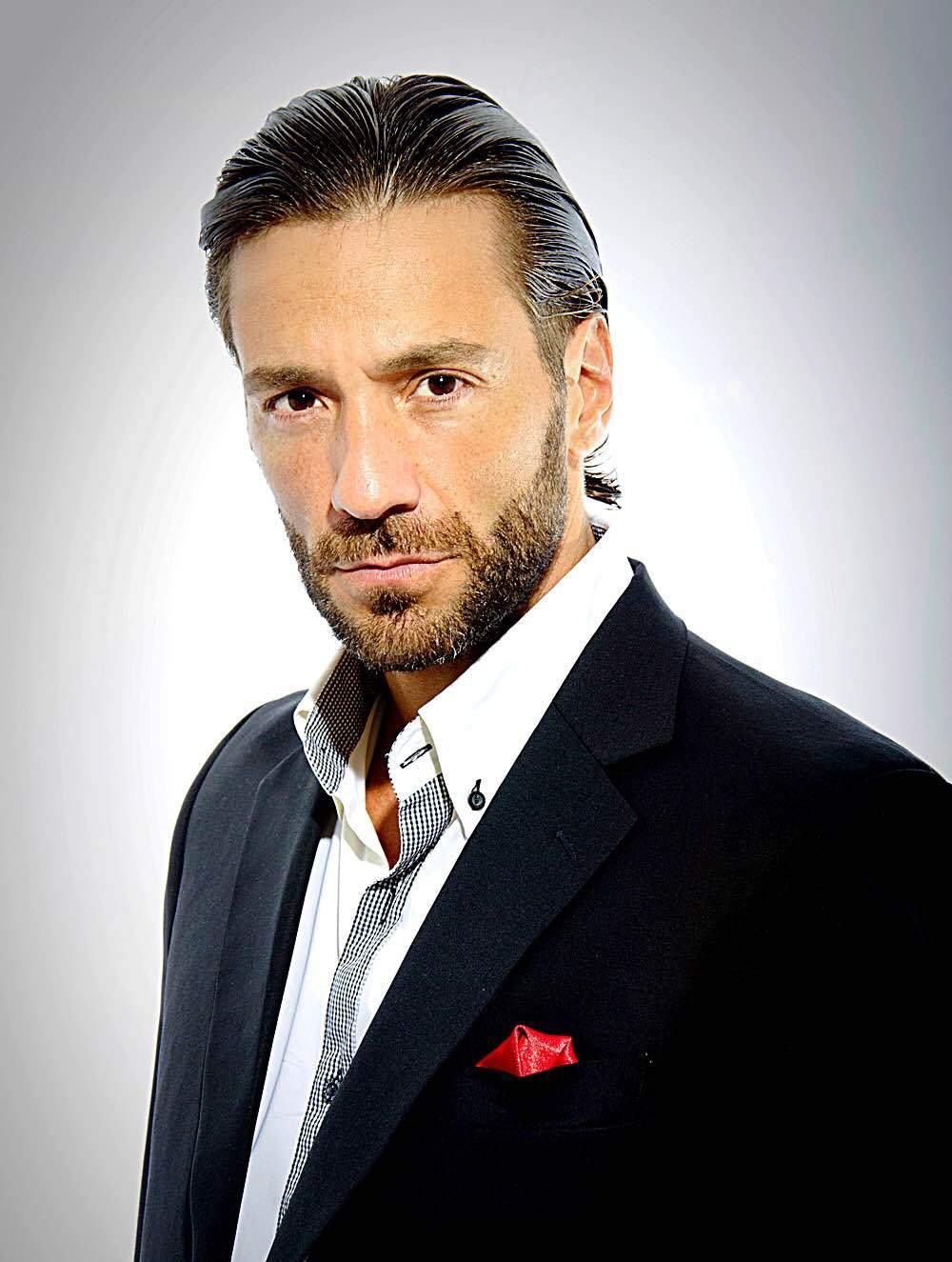 Gustavo Conti en "Mujeres a las que les cagué la vida"